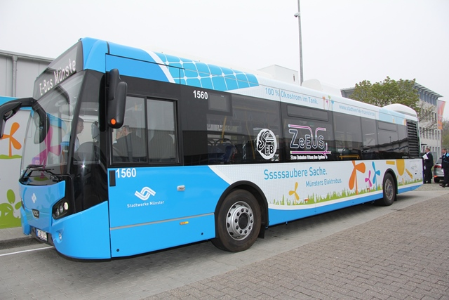 E-Bus in Münster bei der Testfahrt